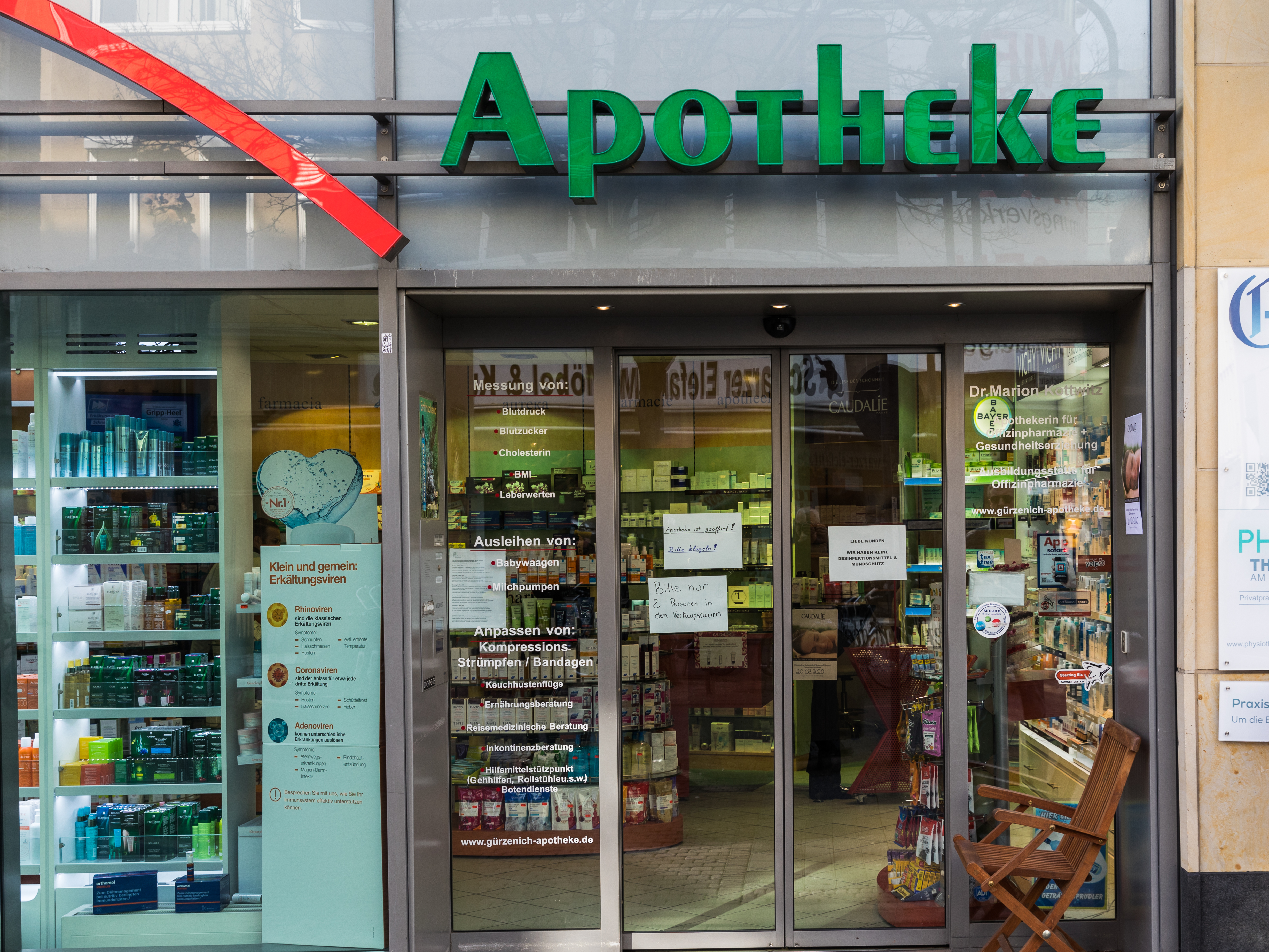 Gürzenich-Apotheke Köln - bitte klingeln während der COVID-19-Pandemie. Und nur 2 Personen im Verkaufsraum. Desinfektionsmittel und Mundschutz ausverkauft